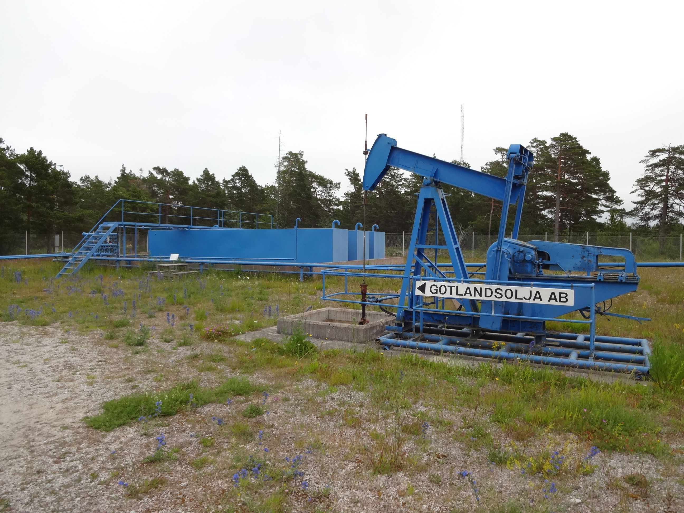 Borrutrustningen vid Risung på Gotland.